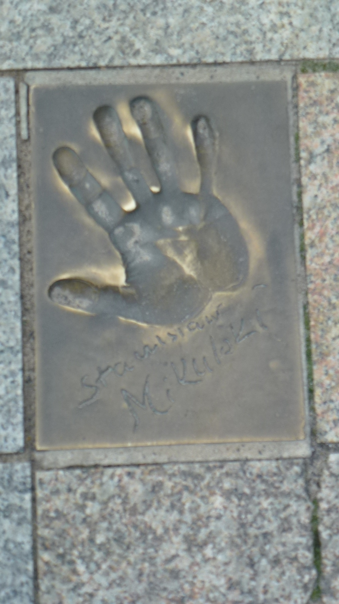 Odcisk gwiazdy na ul. Alei Gwiazd w Międzyzdrojach woj. zachodniopomorskie pow. kamieński